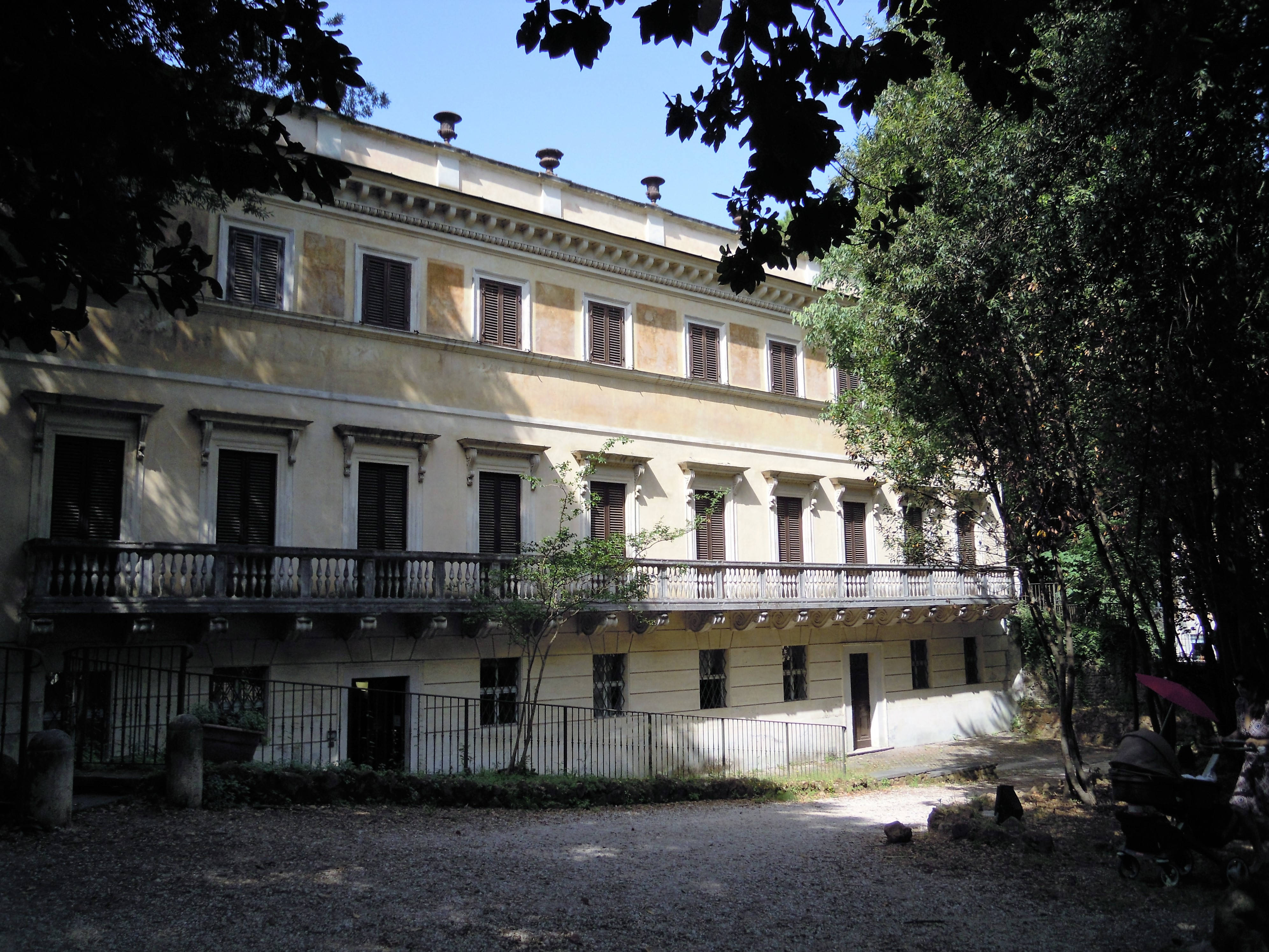 Roma, Villa Torlonia: Casino dei principi (prospetto laterale)